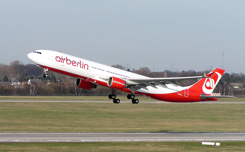 Air Berlin (LTU) Airbus A330-300 (D-AERK) in Düsseldorf (EDDL/DUS)